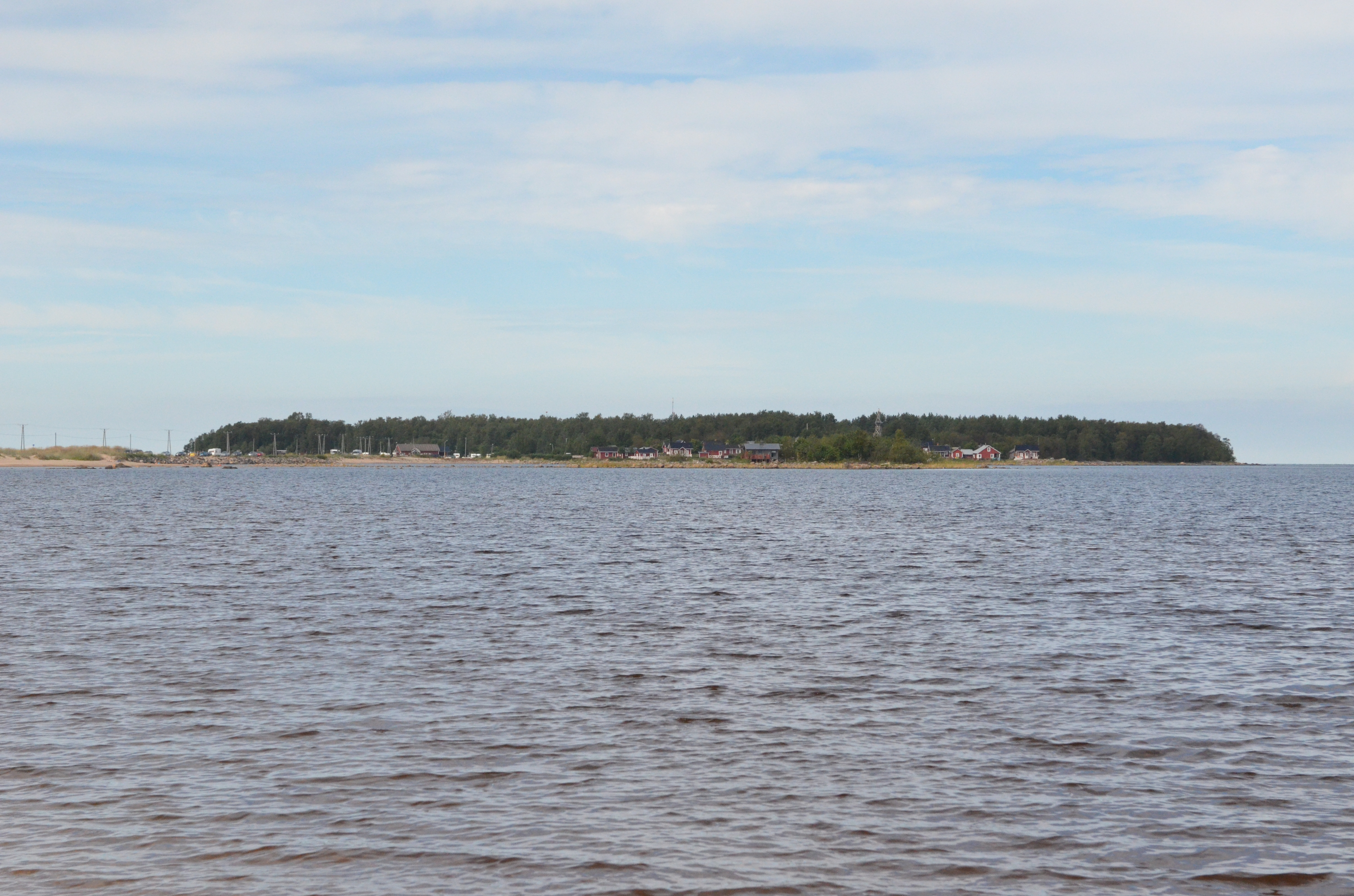 Ohtakari